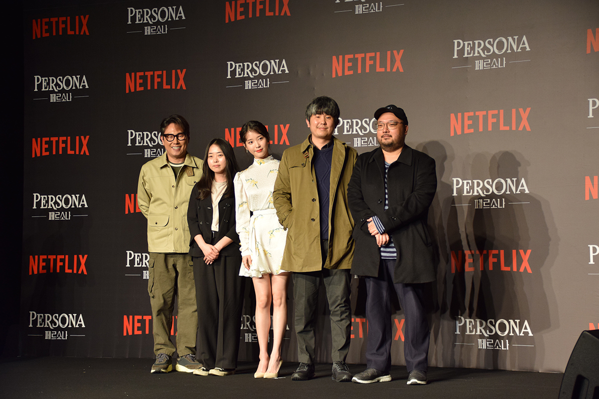 넷플릭스 오리지널 페르소나 제작발표회 윤종신 전고운 이지은(아이유) 김종관 임필성